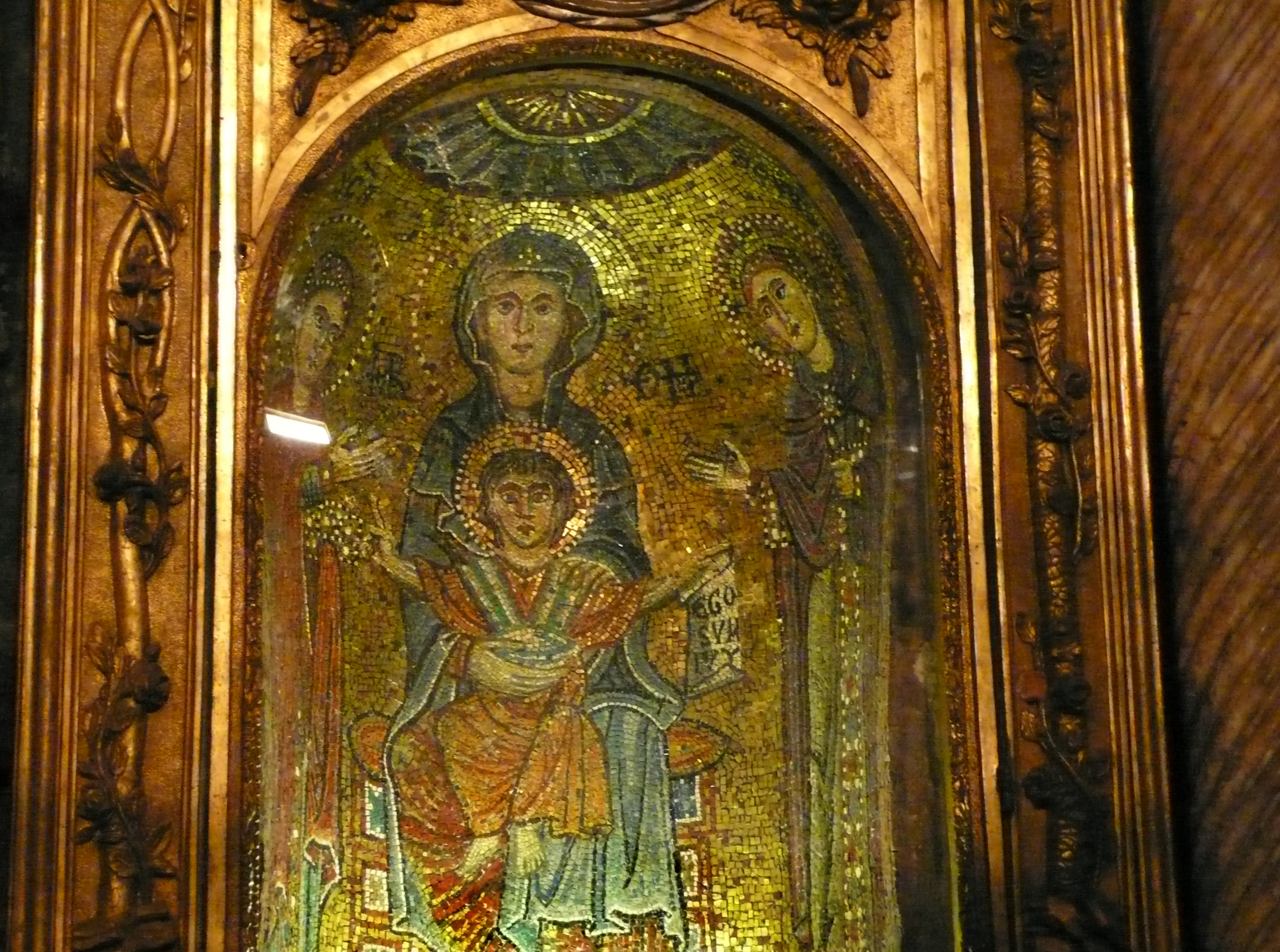 Santa Prassede, Rom; Zeno-Kapelle